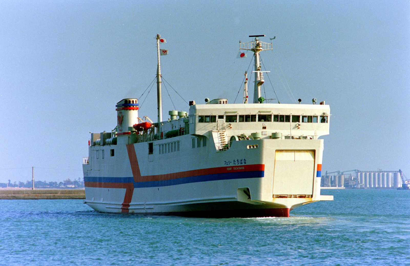 小松島港の南海フェリー・フェリーたちばな。カラーは従来船から一新された。